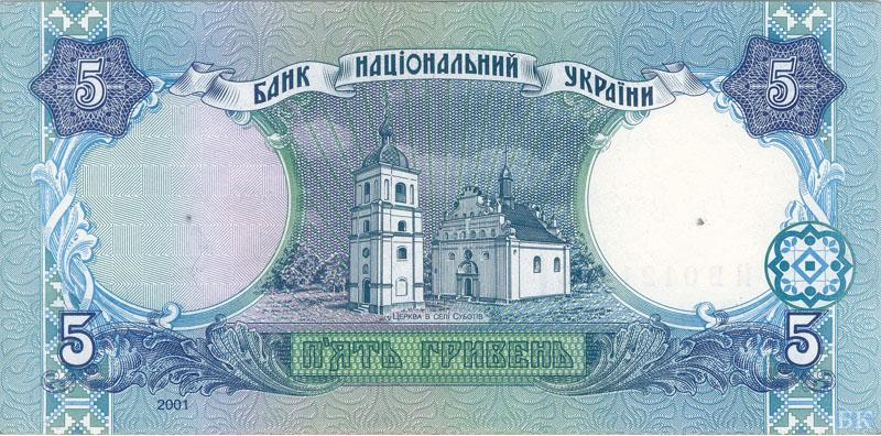 5 гривен 2001, реверс